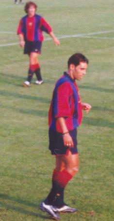 Sergio Santamaría als voetballer van FC Barcelona (juli 2000)